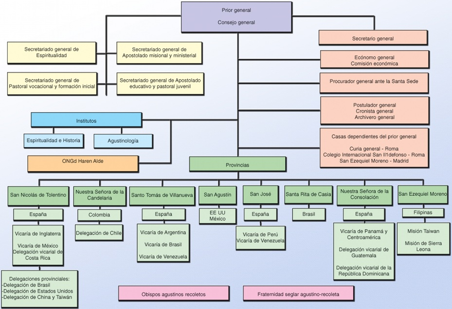 Organigrama de la ORden de Agustinos Recoletos. fuenteː